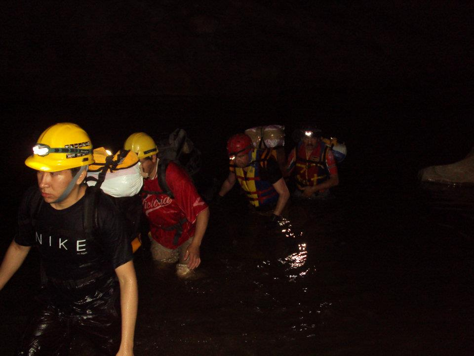 Experiencias increíbles e inolvidables.